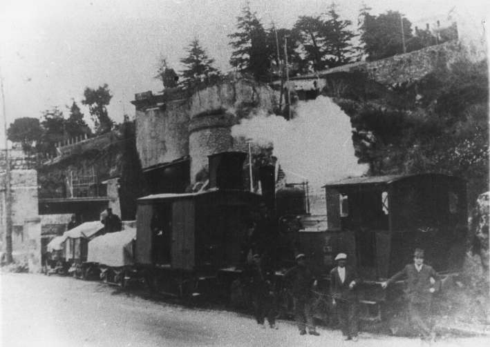 Tranvia Roma-Tivoli, il raccordo della fornace di Carciano, presso Tivoli.